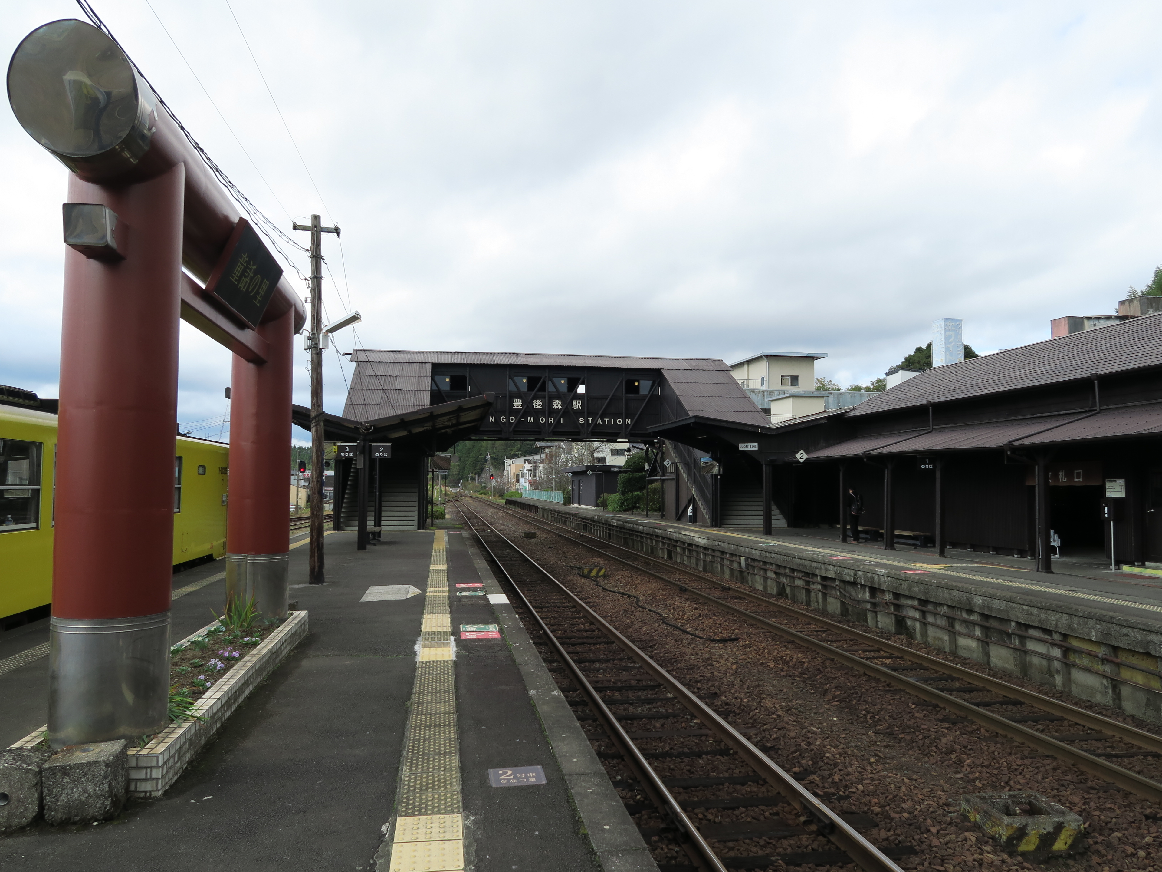 大分県玖珠郡玖珠町 豊後森駅構内(リニューアル後)